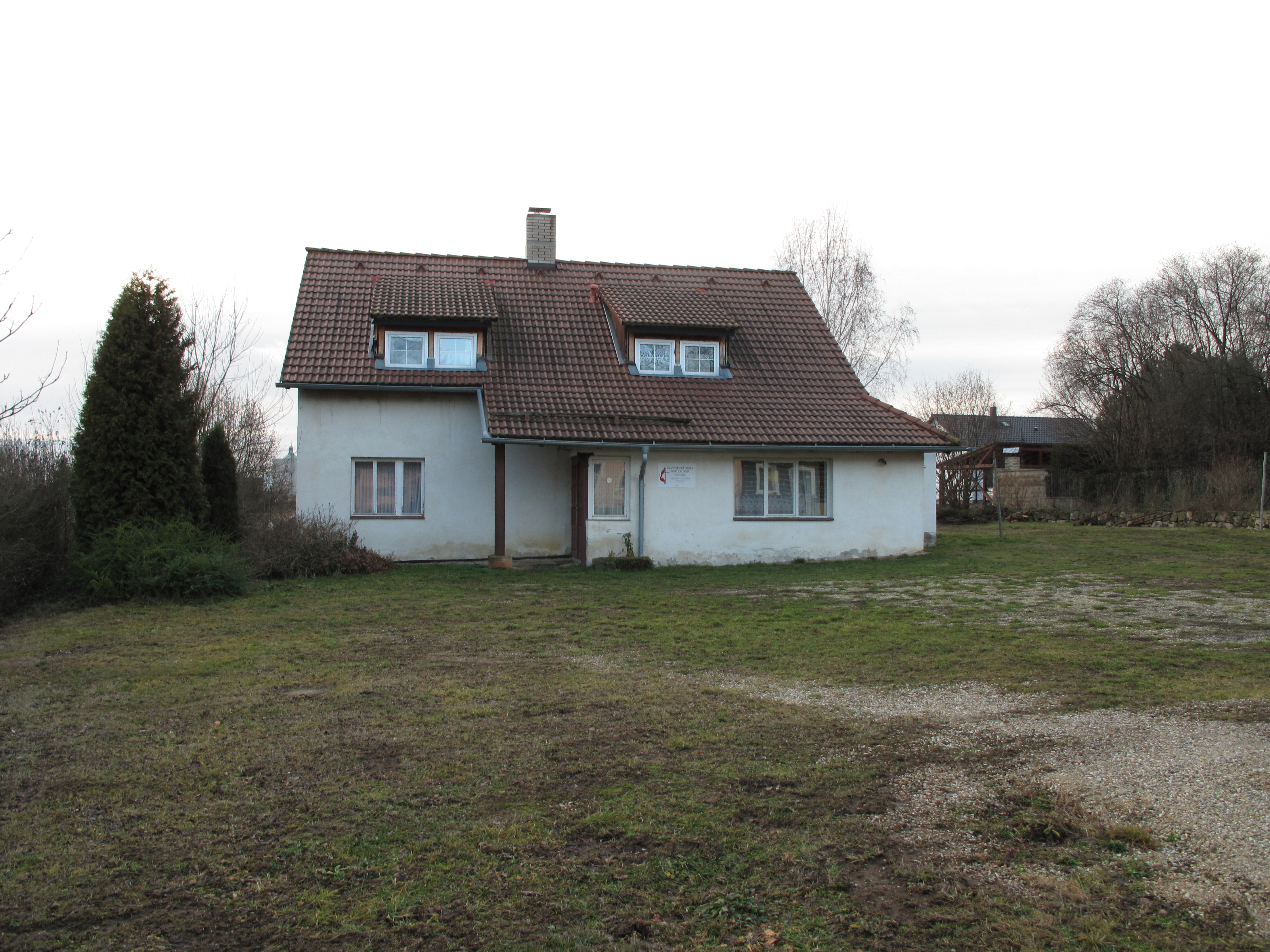 Misijní stanice Misijní stanice Evangelické církve metodistické v Jablonném v Podještědí.